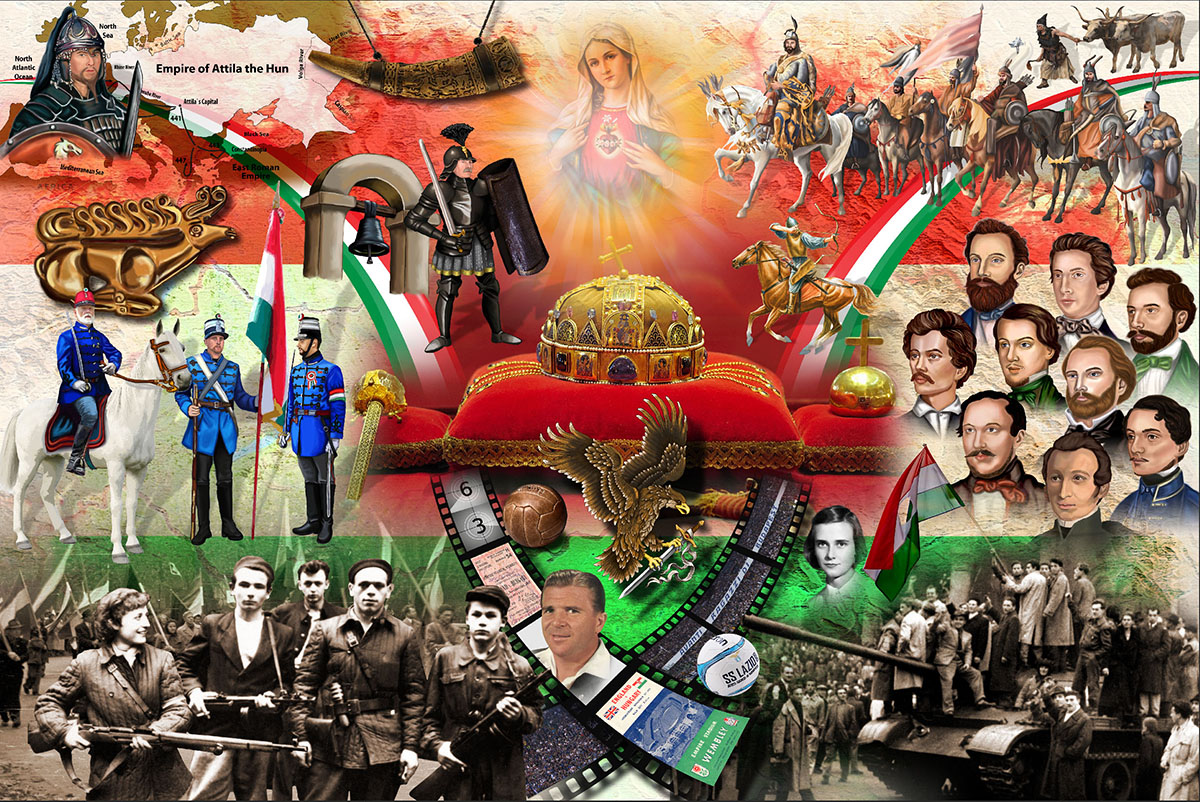 Nemzeti Puzzle – © Kerti Tibor (Tibographia Stúdió) és munkatársai által (Gáll Noémi, Hadi Laura, Németh Szabina, Kurdi István) készített festményekből és fotókból álló 33x22 méteres montázs, melyből a 2.400.000 db-os háromszoros guinness rekord puzzle készült!